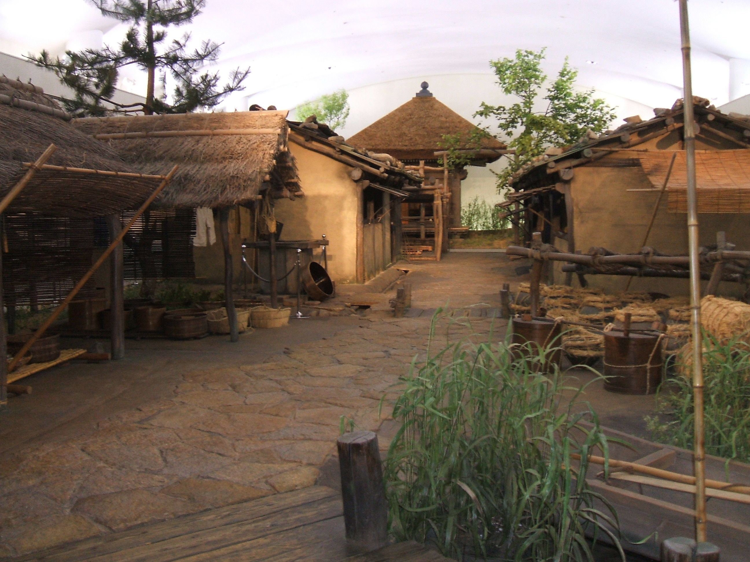 日本の広島県福山市にある草戸千軒町の再現ジオラマ